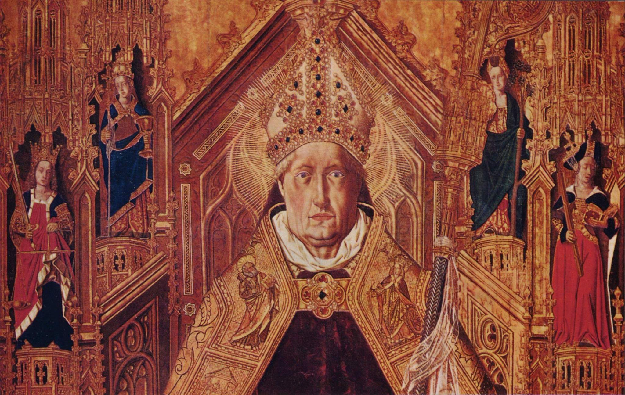 La obra representa a Santo Domingo de Silos entronizado como obispo, y es la tabla central del retablo de Santo Domingo de Silos de la parroquia de Daroca, en la provincia de Zaragoza. El santo aparece vestido de obispo y sentado en un trono gótico decorado con estatuas policromadas de las siete virtudes, las teologales: Fe, Esperanza y Caridad y las cardinales: Prudencia, Justicia, Fortaleza y Templanza. Destaca especialmente el extremo realismo del rostro de Santo Domingo y la fuerza de su mirada, características propias del arte flamenco que, en este caso, no son verídicas sino ideales, ya que fue en el siglo XI cuando el monje Domingo fundó, cerca de Burgos, el Monasterio de Silos, donde vivió. Este realismo contrasta con el abundante uso del oro que, como se había especificado en el contrato, no aparece embutido, como es habitual en Aragón.